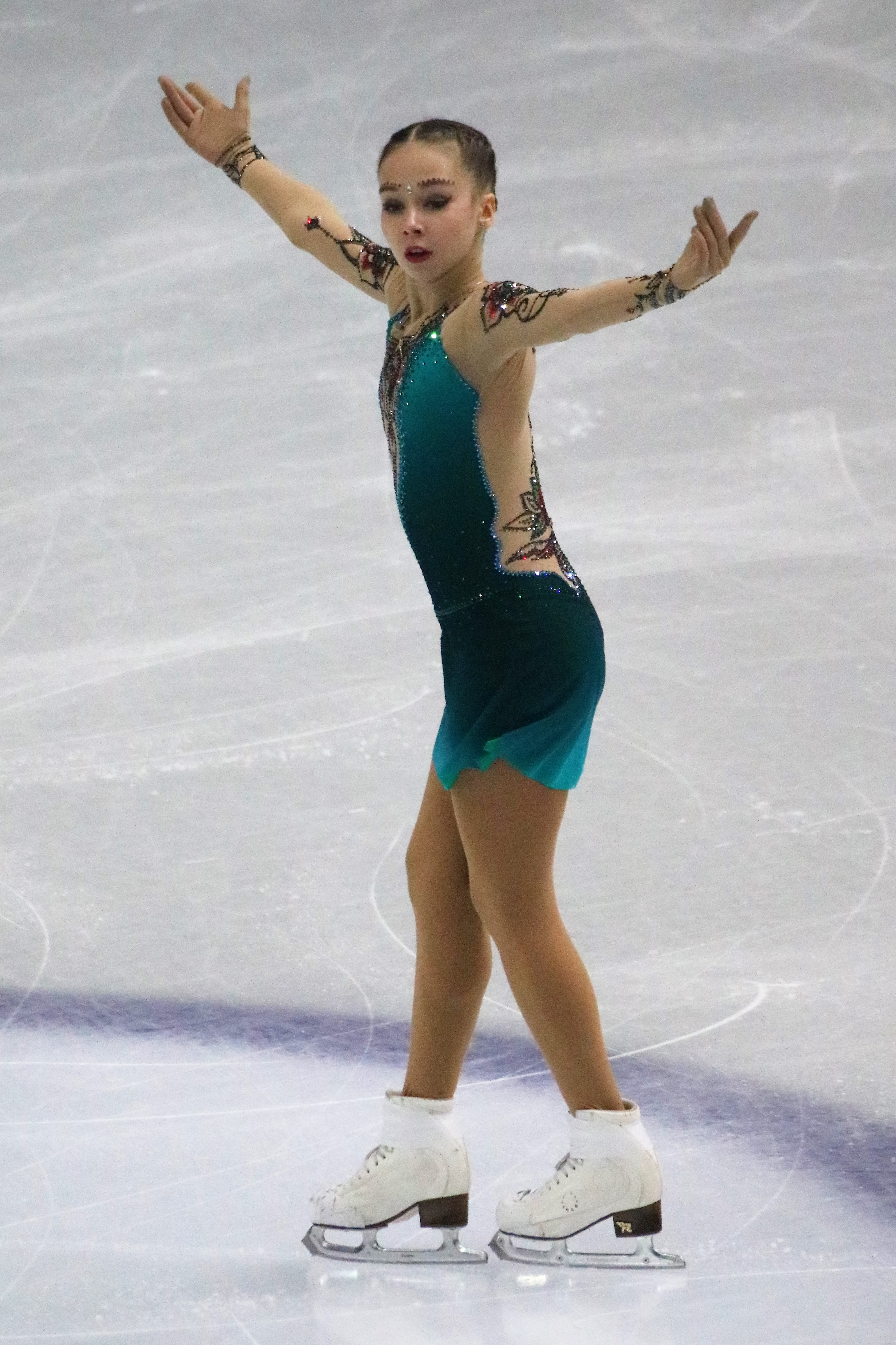 Ксения Синицына (Россия) на финале юниорского Гран-при 2019-2020